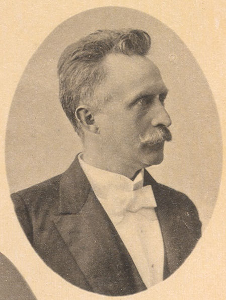 Deze foto is gepubliceerd in Henry Viotta's 'Onze Hedendaagsche Toonkunstenaars' uit 1893. Viotta is in 1933 overleden.